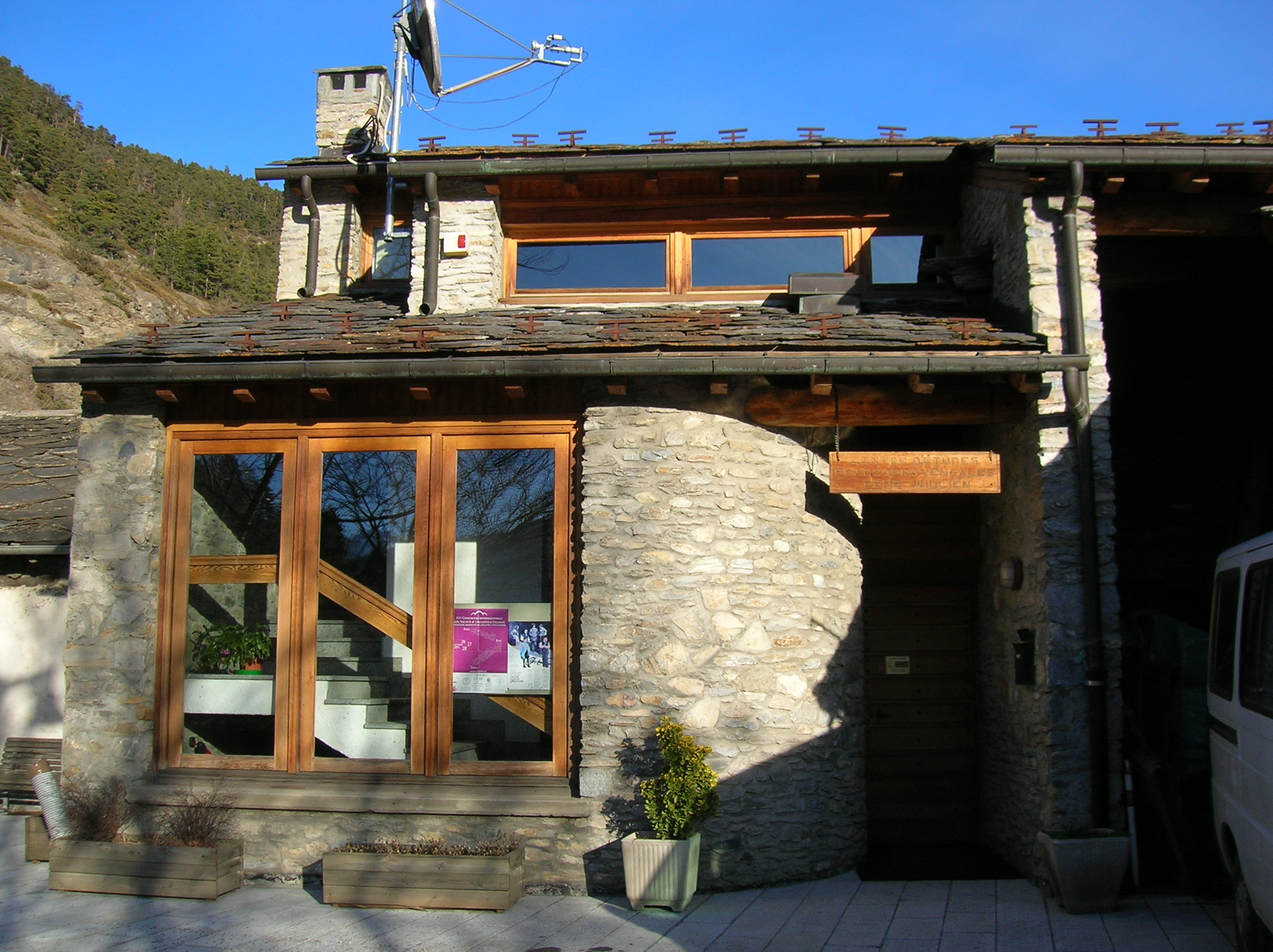 Saint-Nicolas, Valle d'Aosta, Italia.